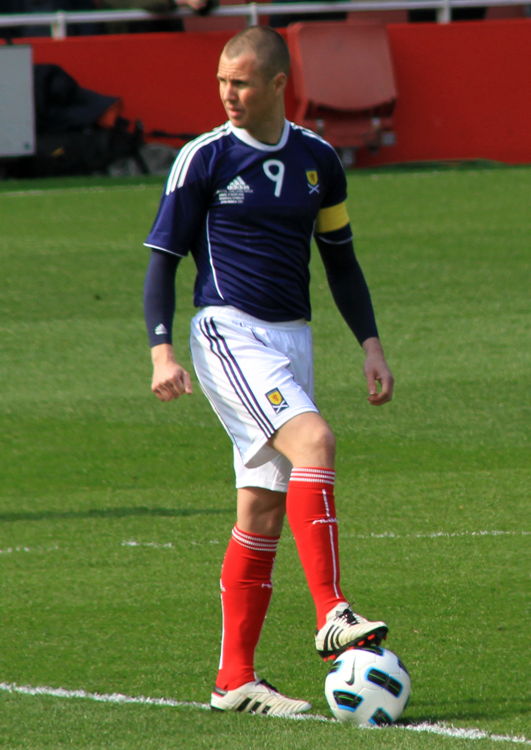 Kick Off